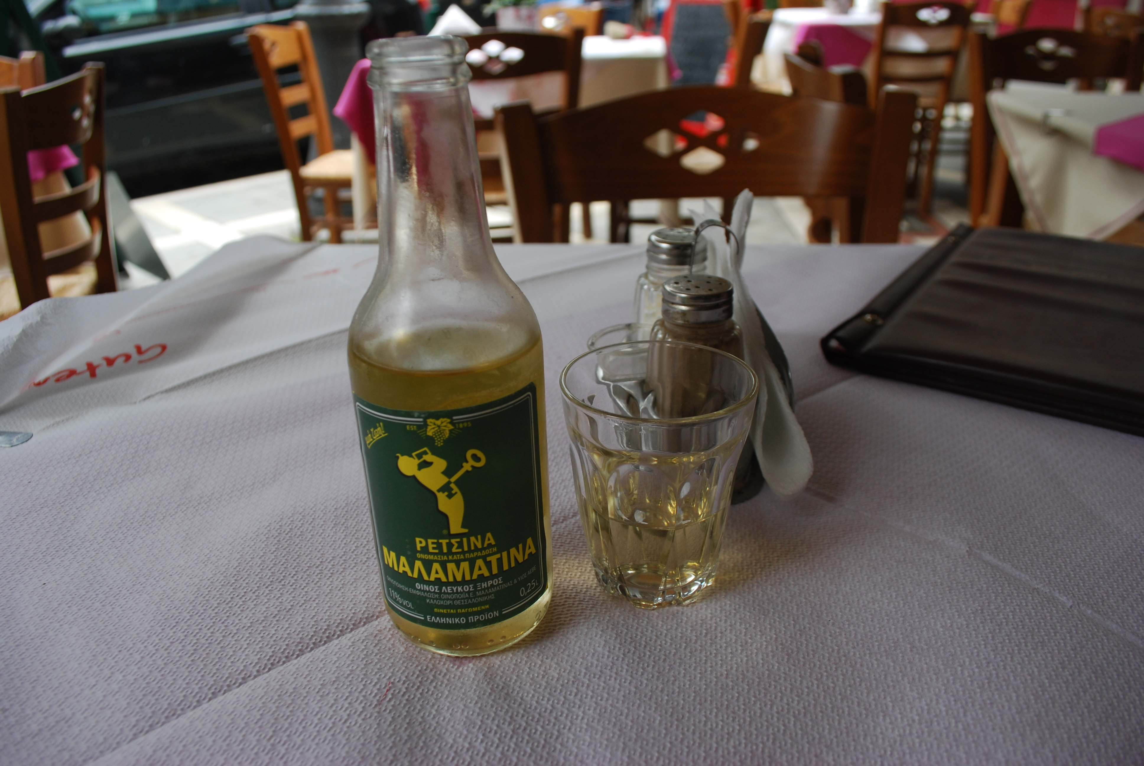 Vue de Ioannina.